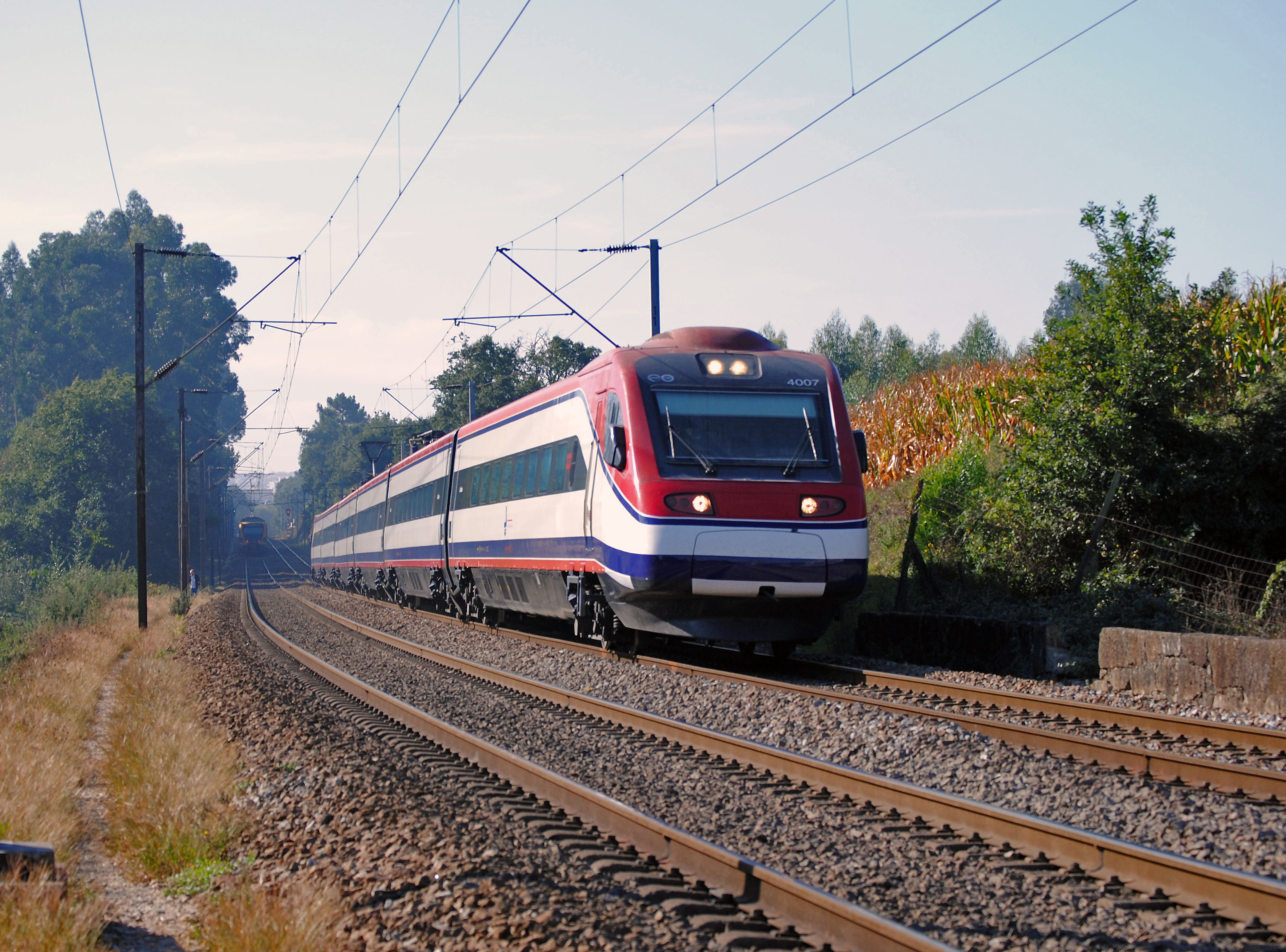 CPA 4007